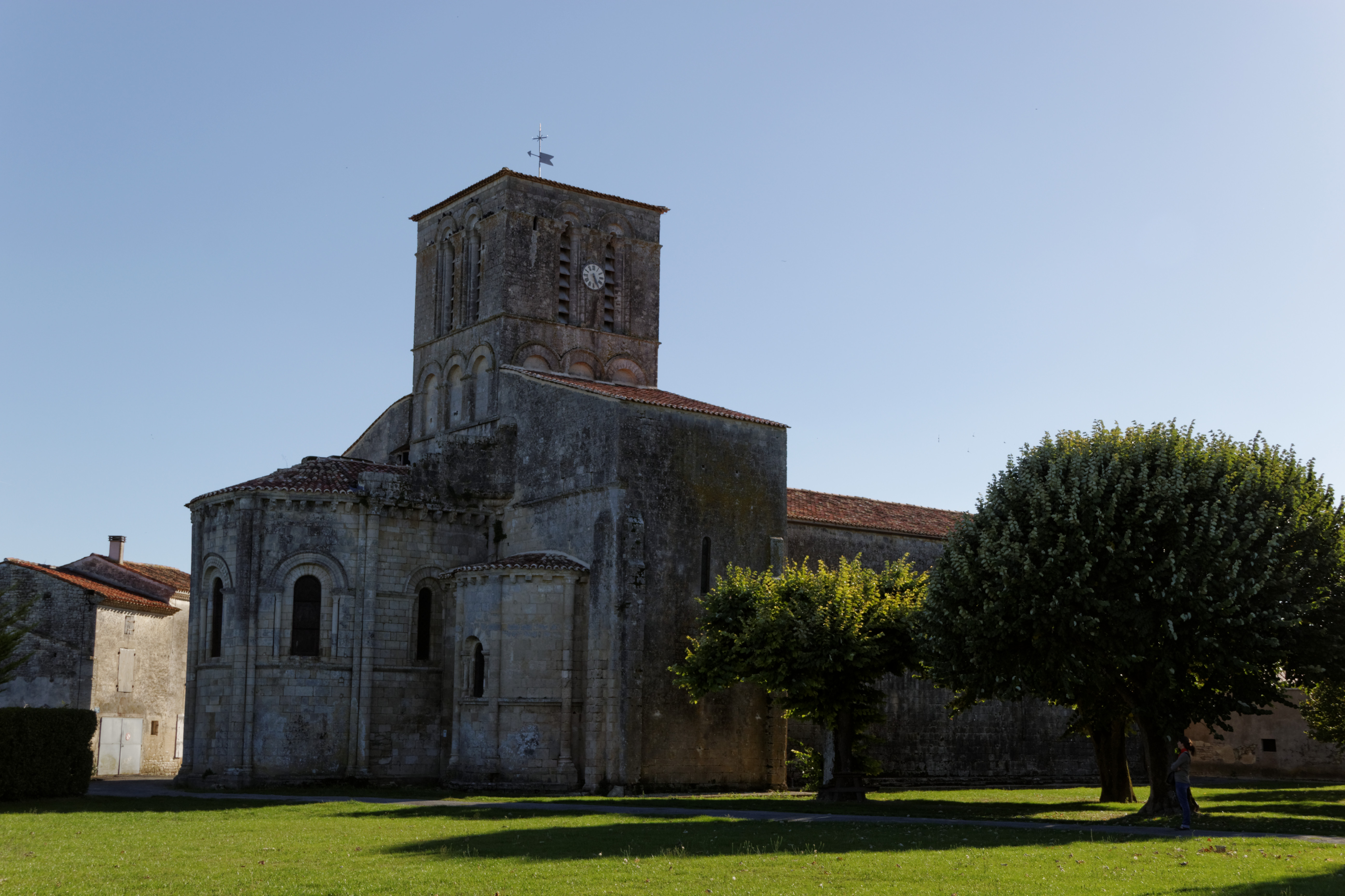 Église Saint-Germain de Varaize (Classé) .